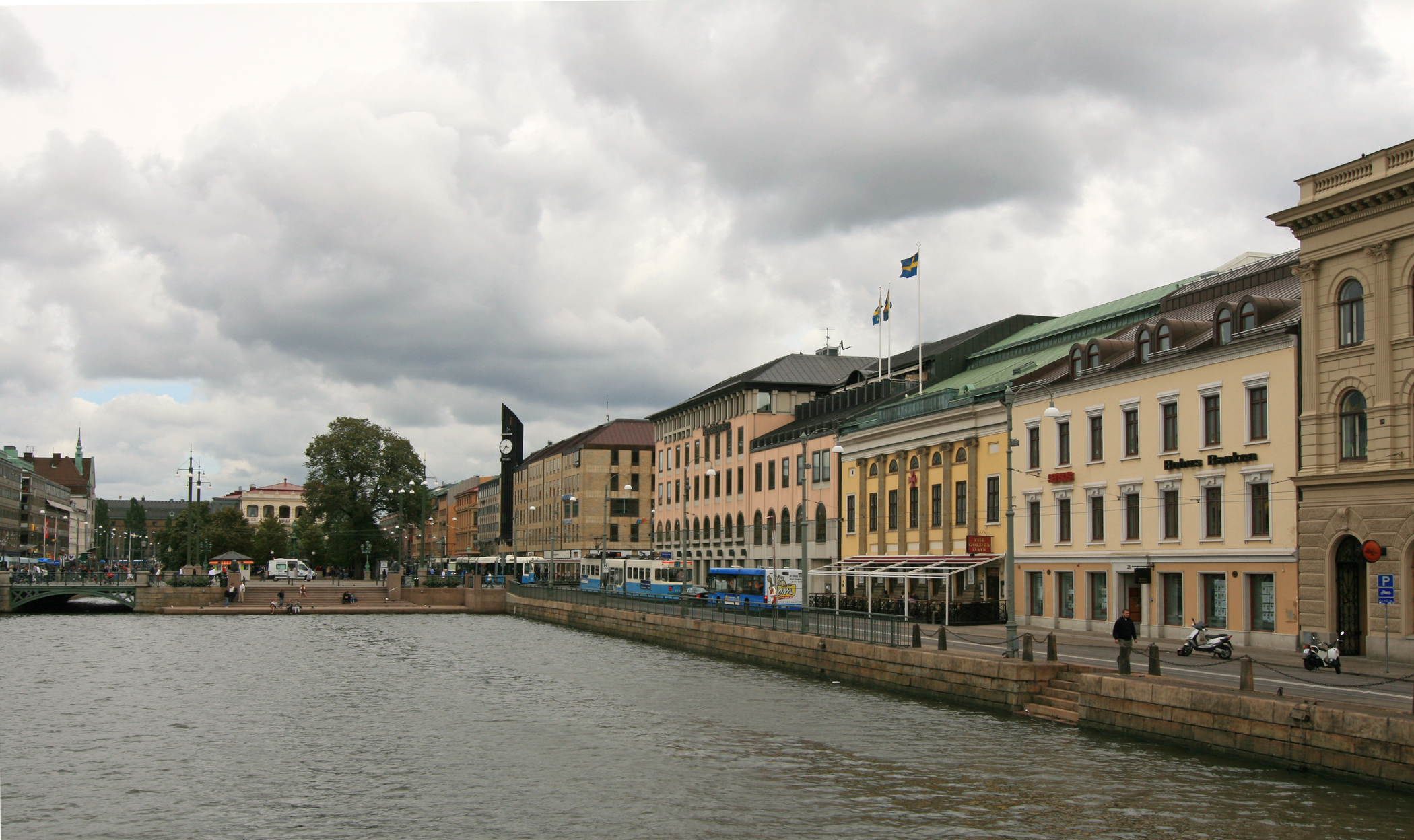 Södra Hamngatan och Stora Hamnkanalen, Göteborg